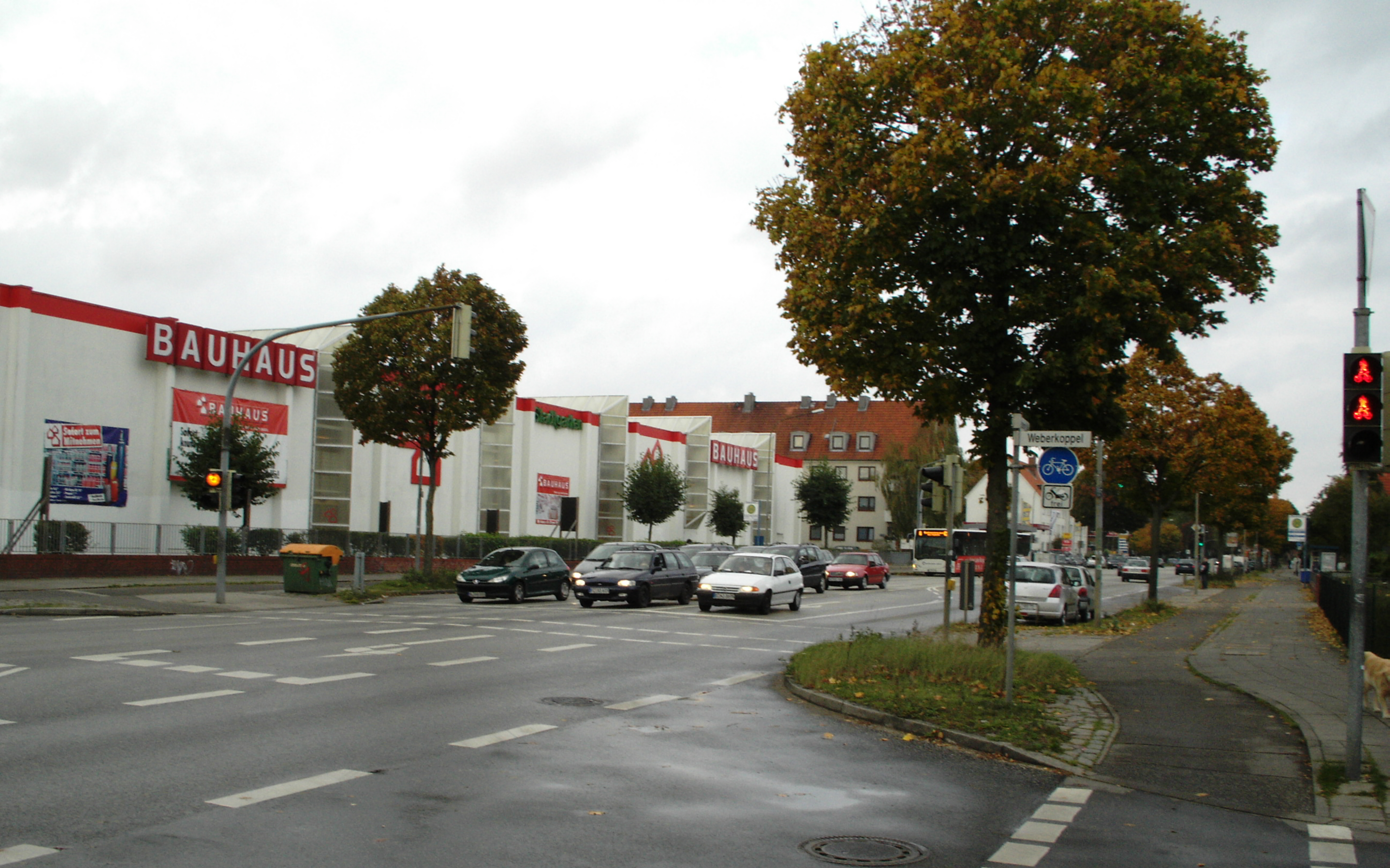 Lübeck-St. Jürgen: Ratzeburger Allee, Blick nach Norden in Richtung Innenstadt